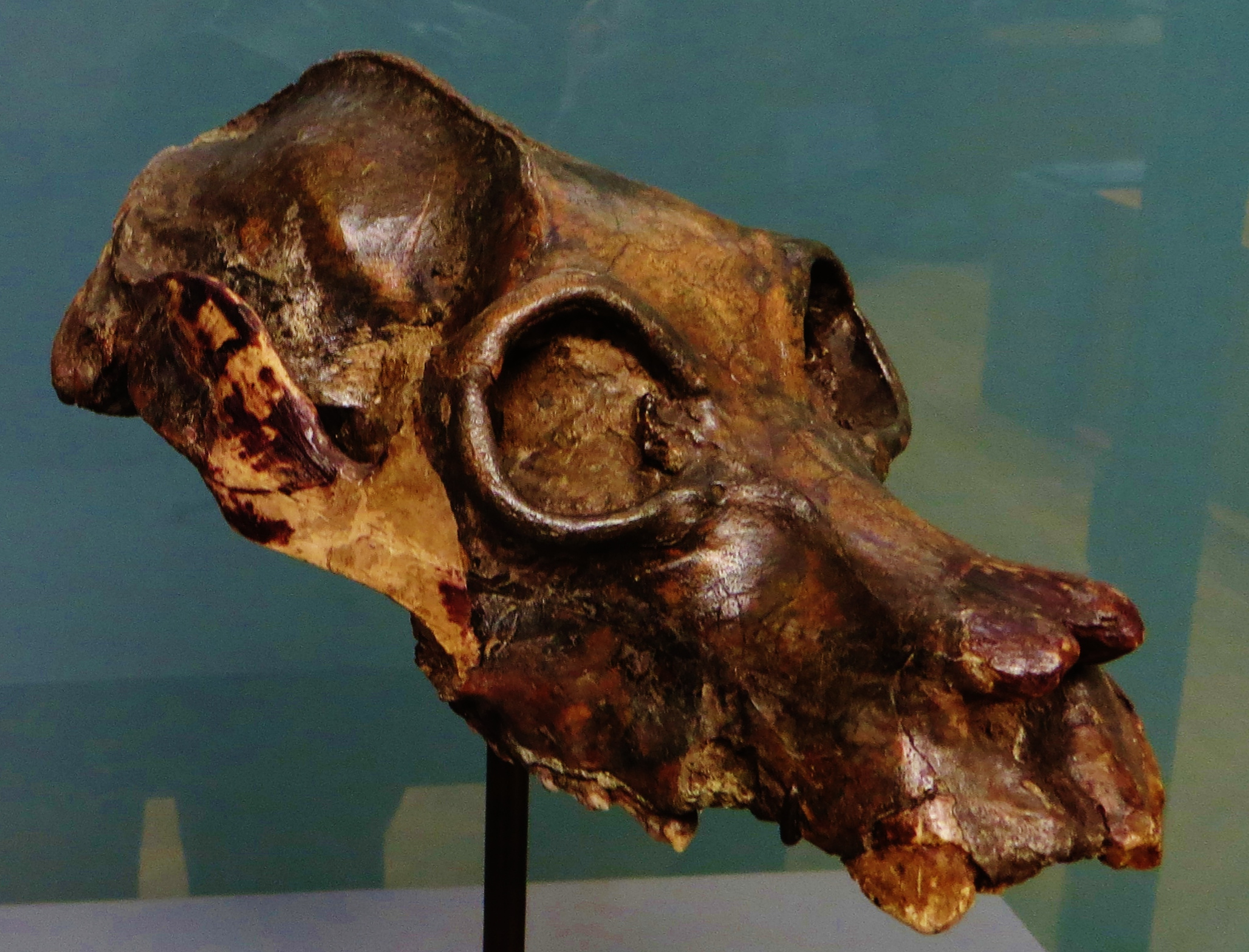 Fossil of Palaeopropithecus, an extinct mammal- Took the photo at Musee d'Histoire Naturelle, Paris